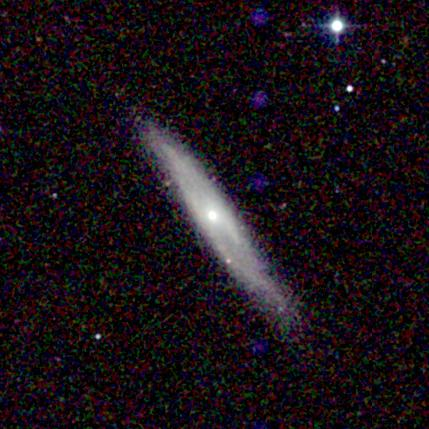 Galaxy NGC 3877